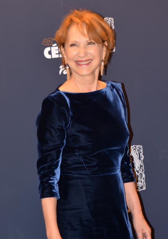 Nathalie Baye à la cérémonie des César